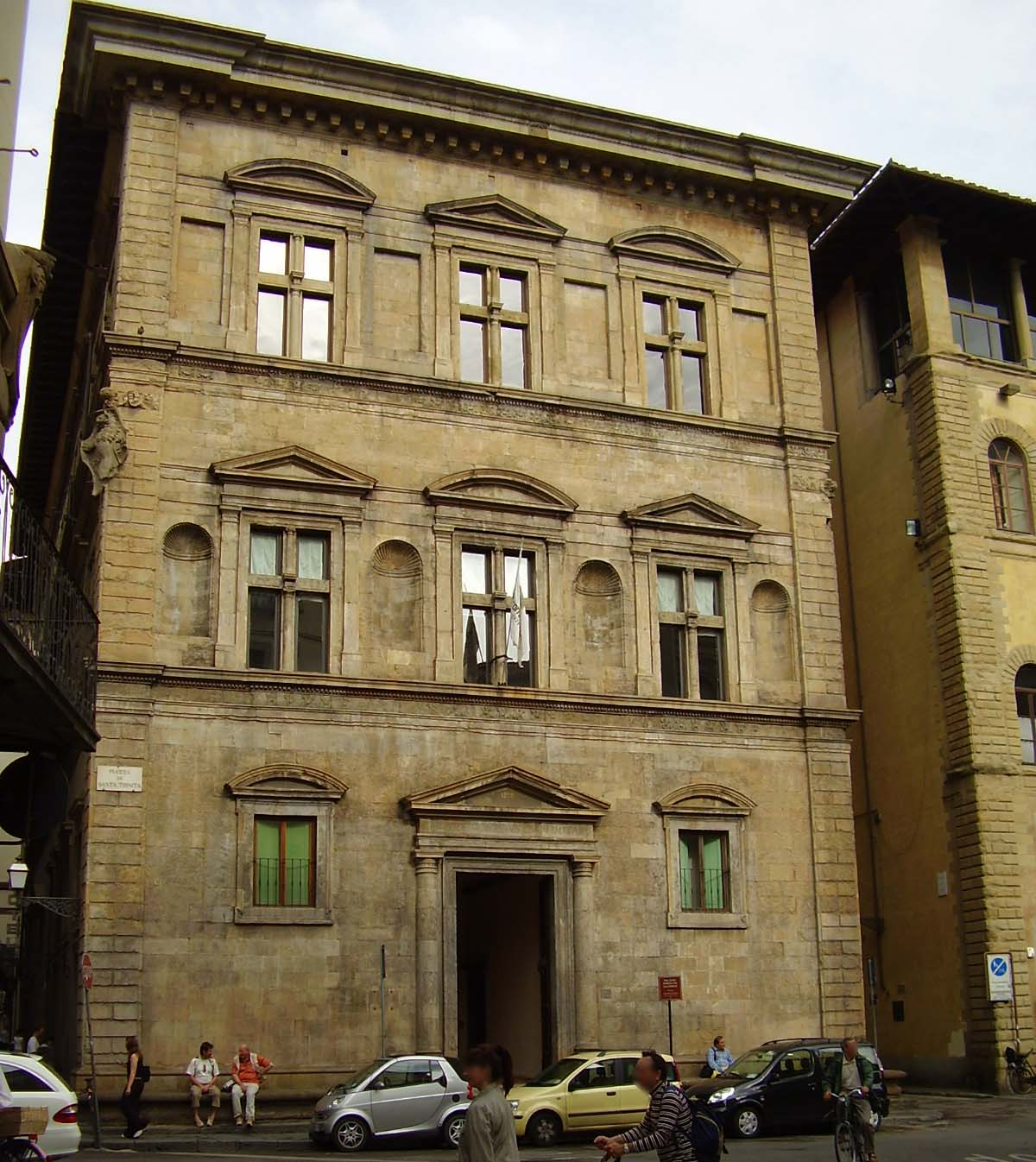 Palazzo Bartolini Salimbeni (Santa Trinita Square) in Florence, Italy